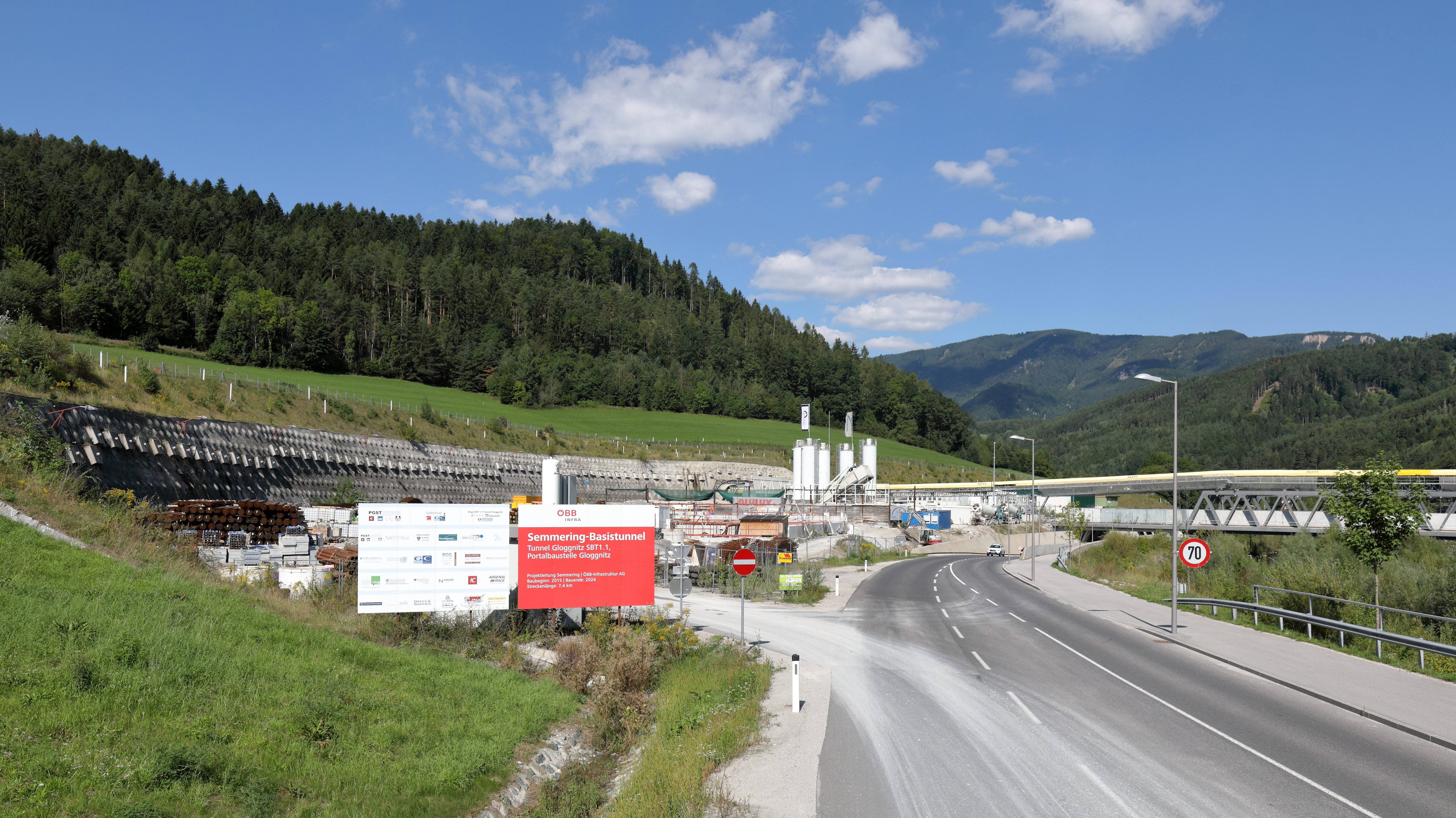 Baustelle (Herbst 2019) beim Ostportal des Semmering-Basistunnels (SBT) am Rande der niederösterreichischen Stadt Gloggnitz.Der SBT wird in drei Baulosen errichtet, hat eine Gesamtlänge von 27,3 km und soll 2026 in Betrieb gehen. Das Portal und der Tunnelabschnitt Gloggnitz mit einer Länge von ca. 7,4 Km gehört zum Baulos 1.1., ist mit rd. 450 Mio. Euro budgetiert und wird von den Firmen Implenia Österreich, HOCHTIEF Infrastructure Austria und Thyssen Schachtbau errichtet.